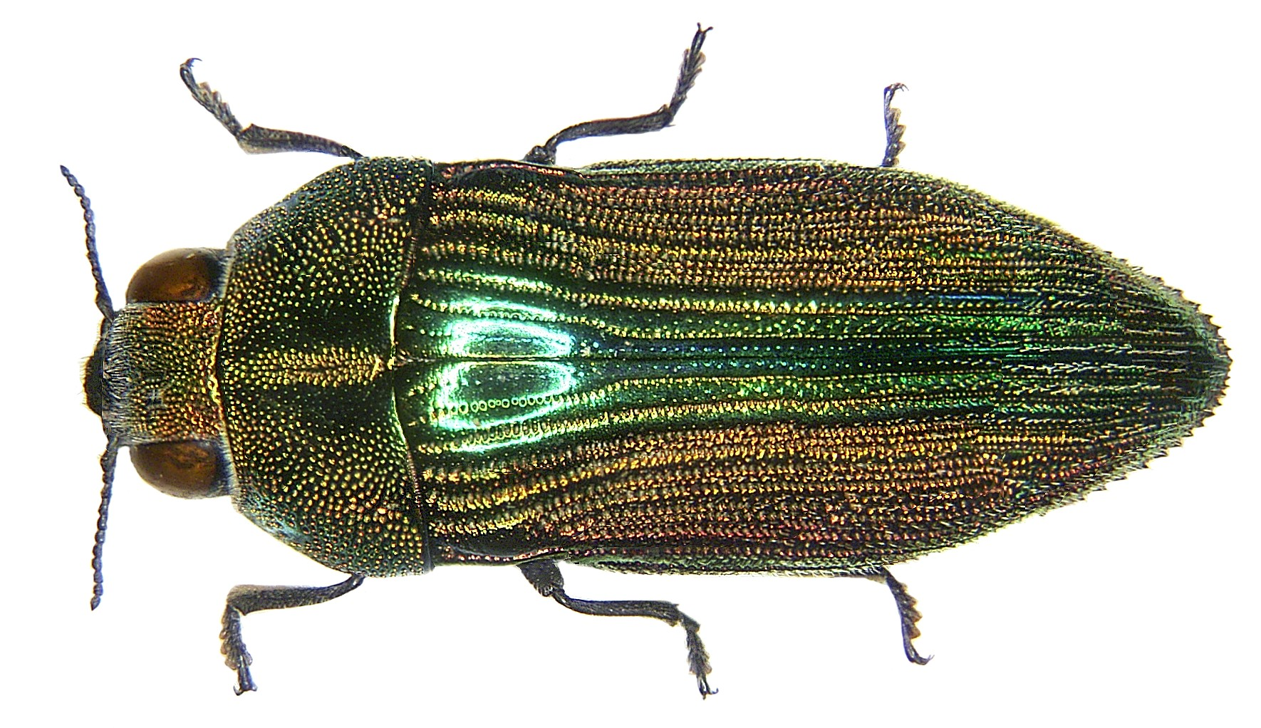 Familie: Buprestidae Grösse: 16 mm Fundort: Namibia, Okaukuejo, Outjo leg. U.Schmidt, 1994; det. Mühle Foto: U.Schmidt, 2006